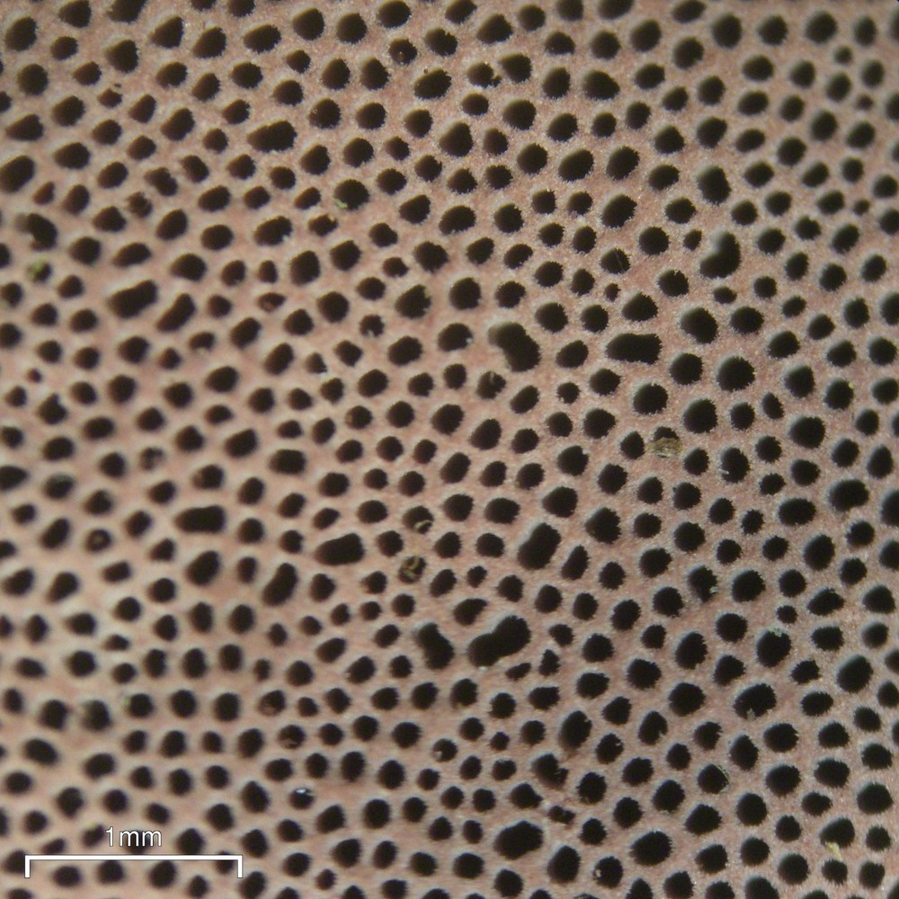 Fomitopsis rosea (Alb. & Schwein.) P. Karst 20090907.14 Wells Gray Park, BC